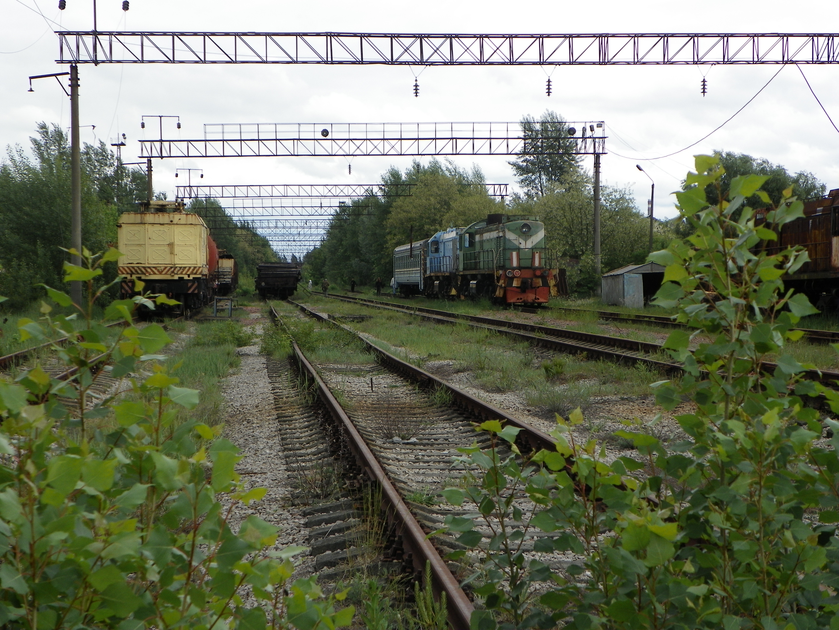 Залізнична станція "Янів" у Чорнобильській зоні